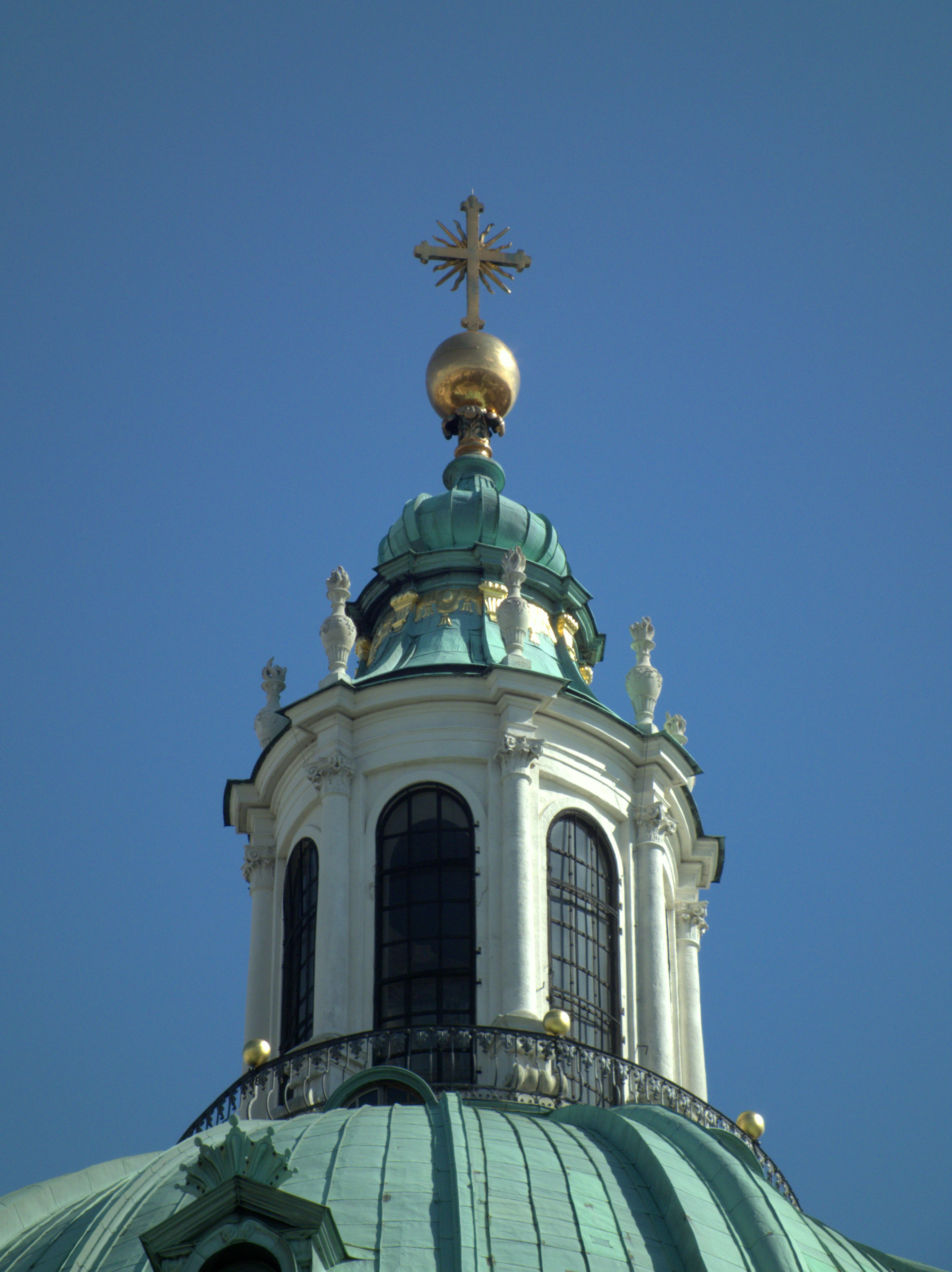 Kirche St. Karl Borromäus (Karlskirche) in Wien